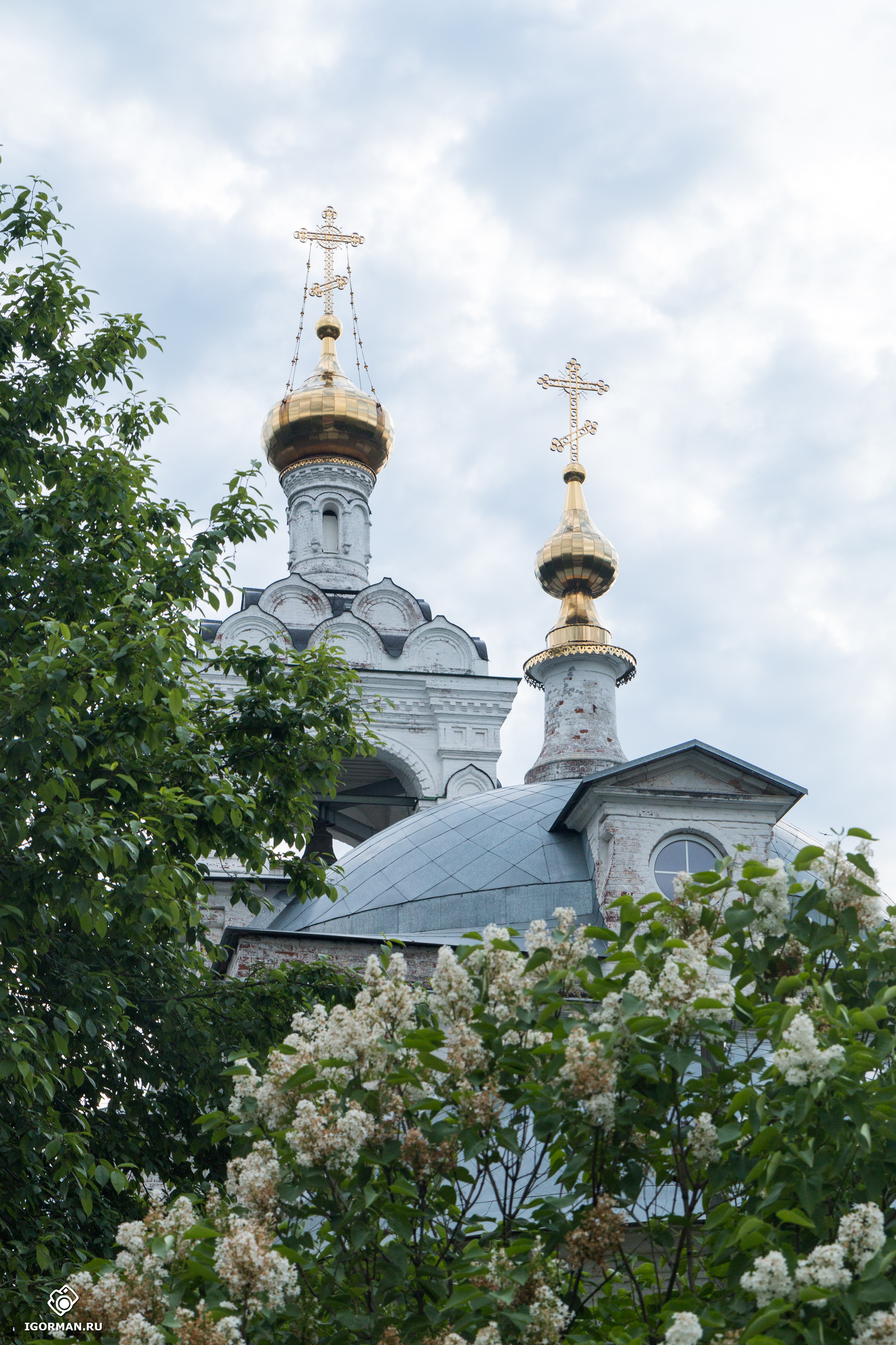 Храм Михаила-Архангела в с.Загорново (Раменский район, Московская область)